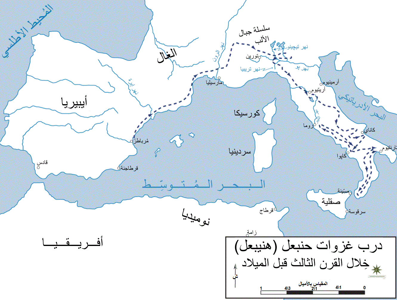 درب غزوات وفُتوحات حنبعل (هنيبعل).